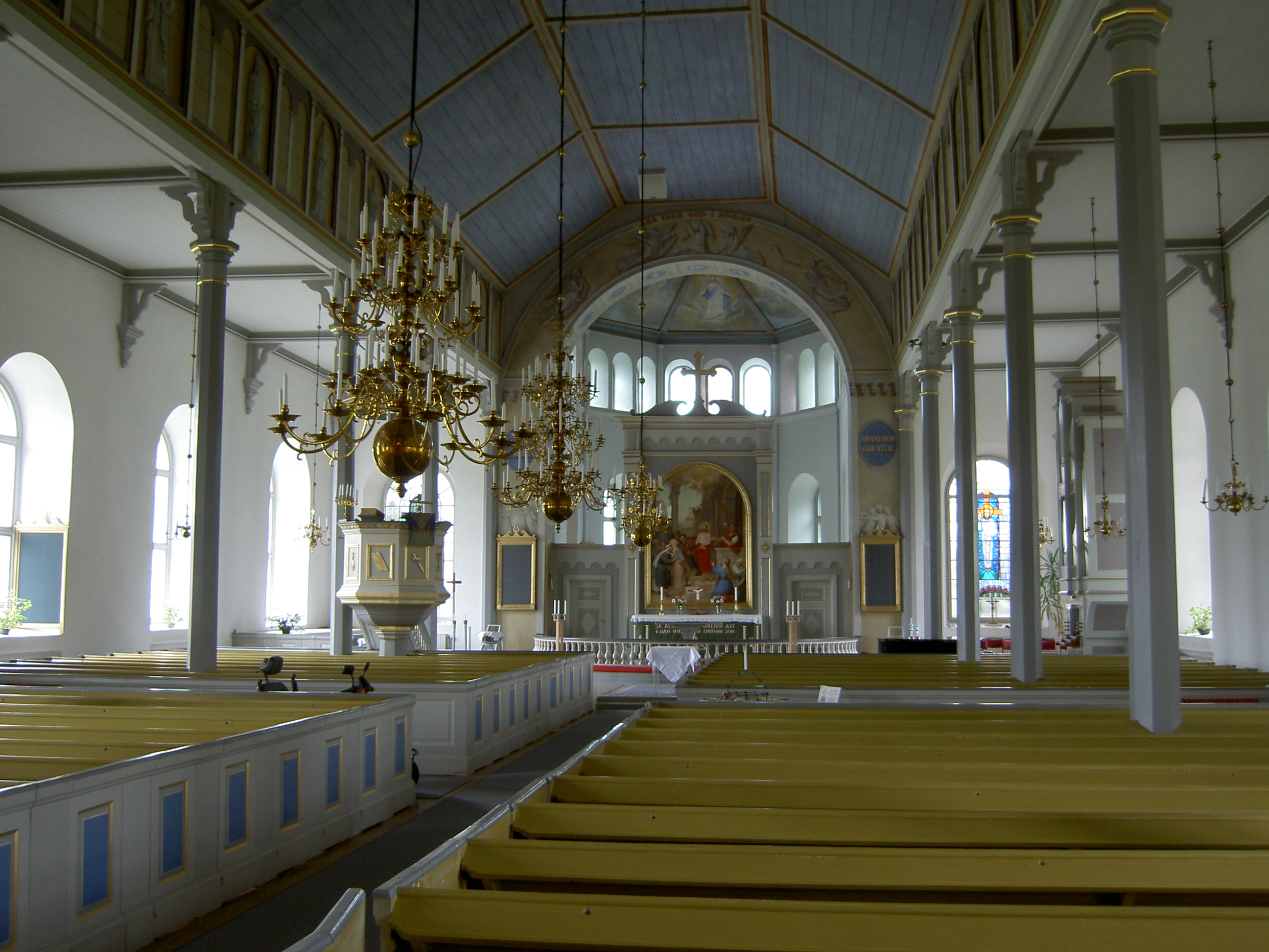 Kyrksal i Kyrkhults kyrka